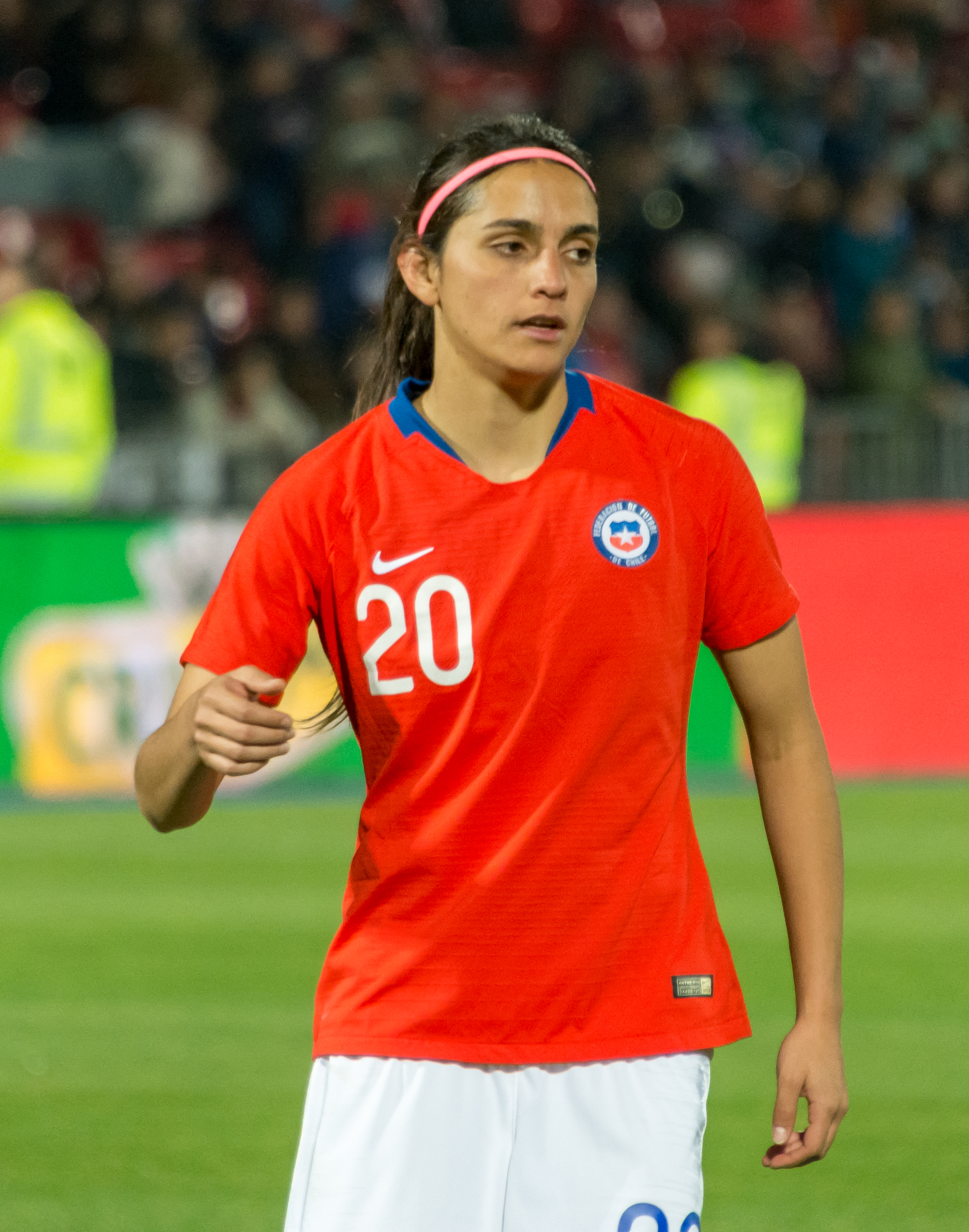 Daniela Zamora, Chile v Colombia, Estadio Nacional, Ñuñoa, Santiago, Chile.